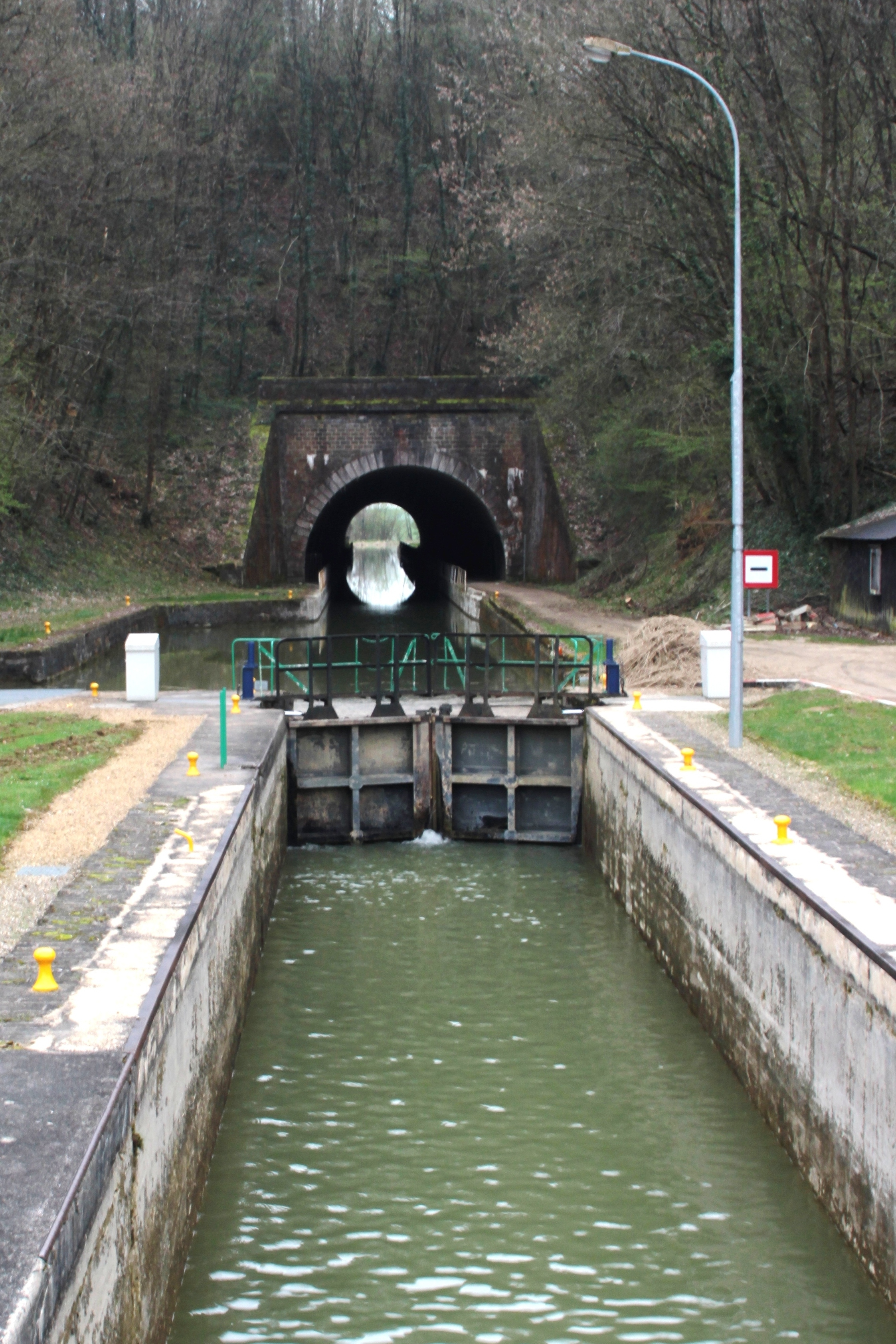 Canal des Ardennes Ecluse 4 Saint-Aignan